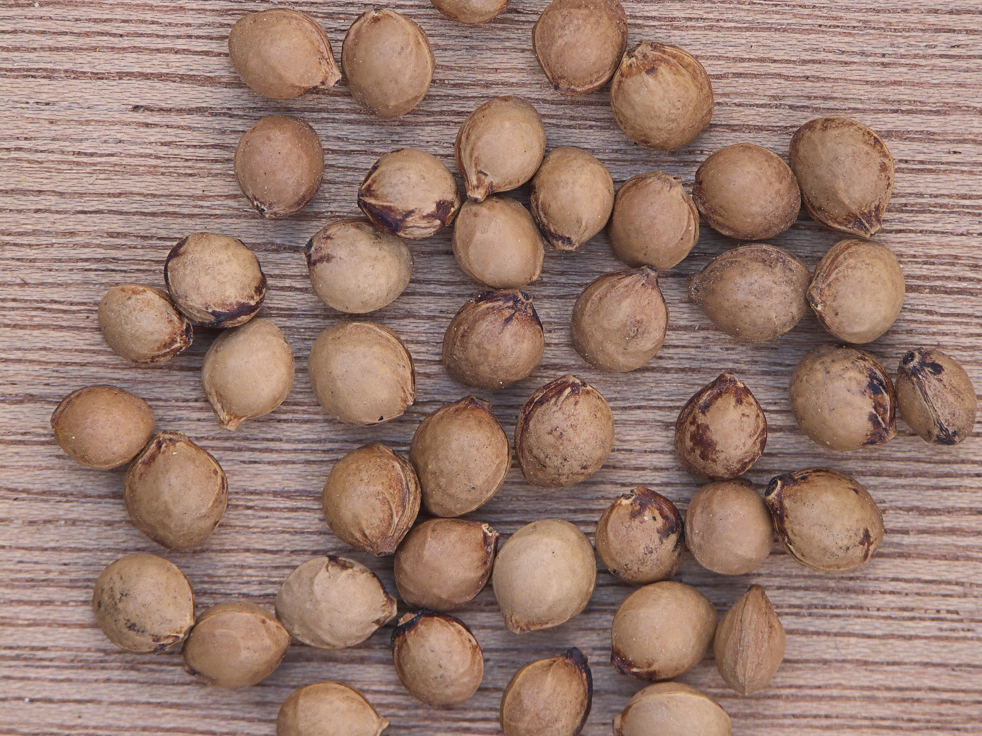 Prunus serotina drupes, size 6-7 mm, Amerikaanse vogelkers pitten